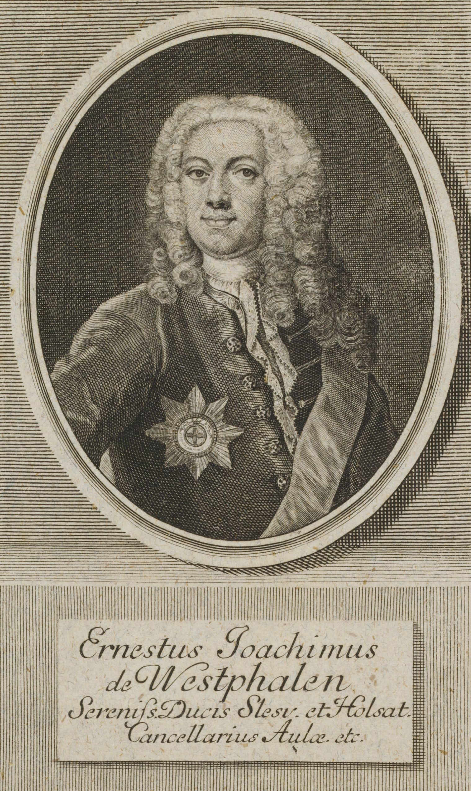 Ernestus Joachimus de Westphalen